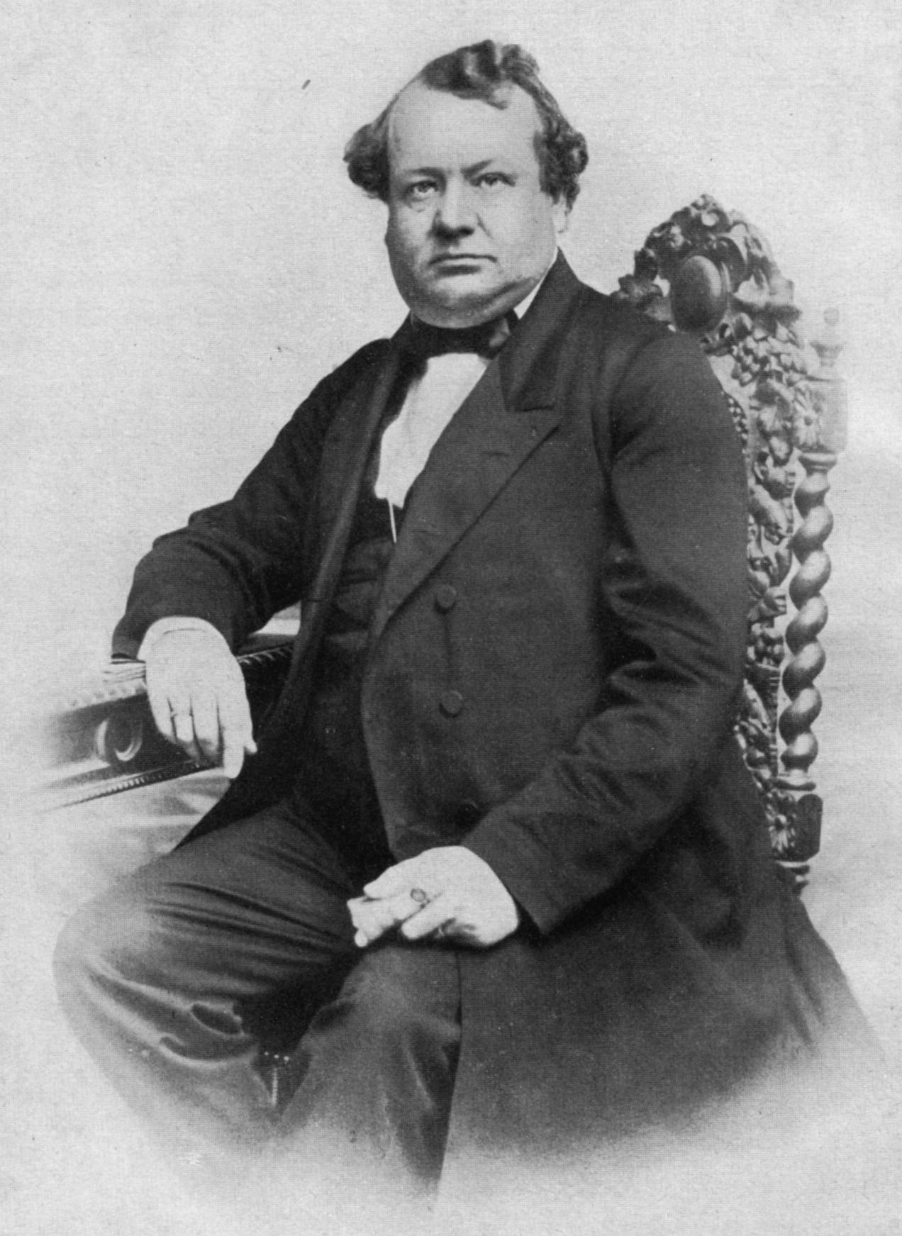 Ernst Geßler (1818-1884), württembergischer Innenminister 1864-70